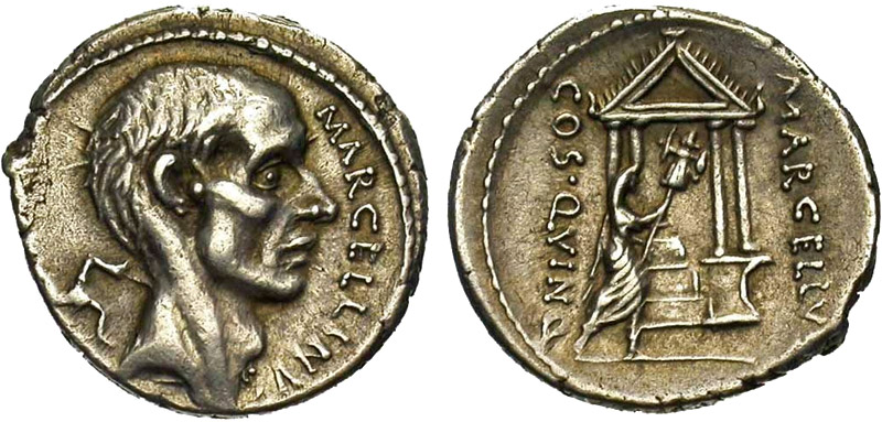 Монетарий Публий Корнелий Лентул Марцеллин. Выпуск в честь консула М. Клавдия Марцелла Денарий, серебро Дата чеканки: 50 г. до н. э.* Монетный двор: Рим вес: 4.03 г АВЕРС: Обнаженная голова консула М. Клавдия Марцелла вправо; сзади — фигура из трех ног, triscelis, спереди — MARCELLINVS, имя монетария. РЕВЕРС: Тетрастильный храм, перед которым фигура М. Клавдия Марцелла в тоге, под покрывалом, несущего трофей. По сторонам: MARCELLVS COS. QVINQ. (Marcellus consul quinquies)